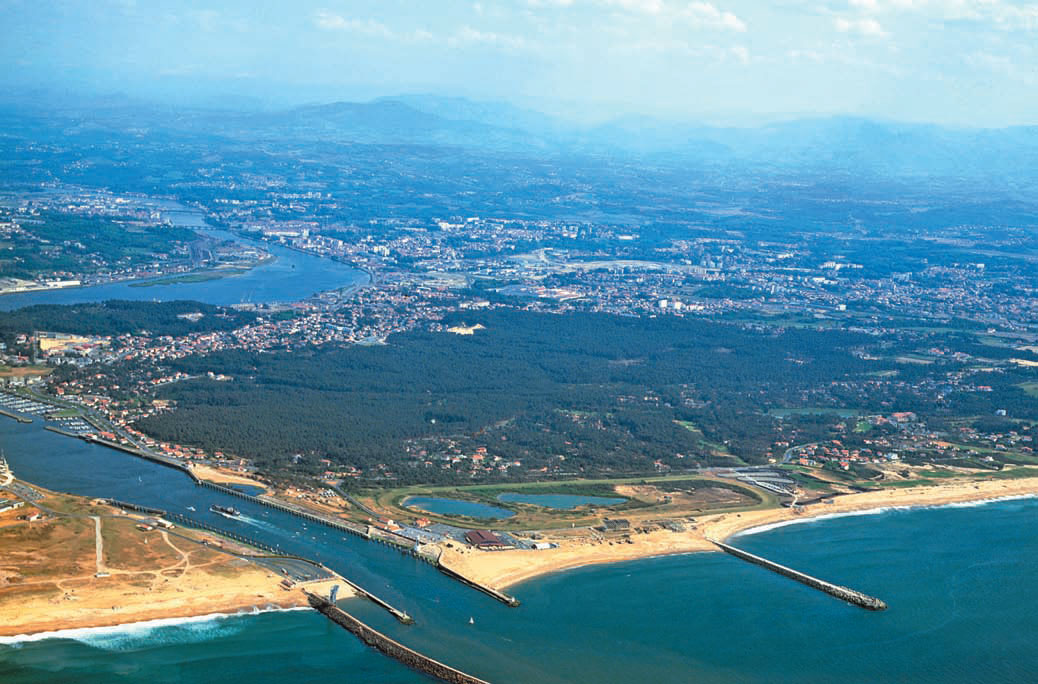 Atturriren itsasoratzea